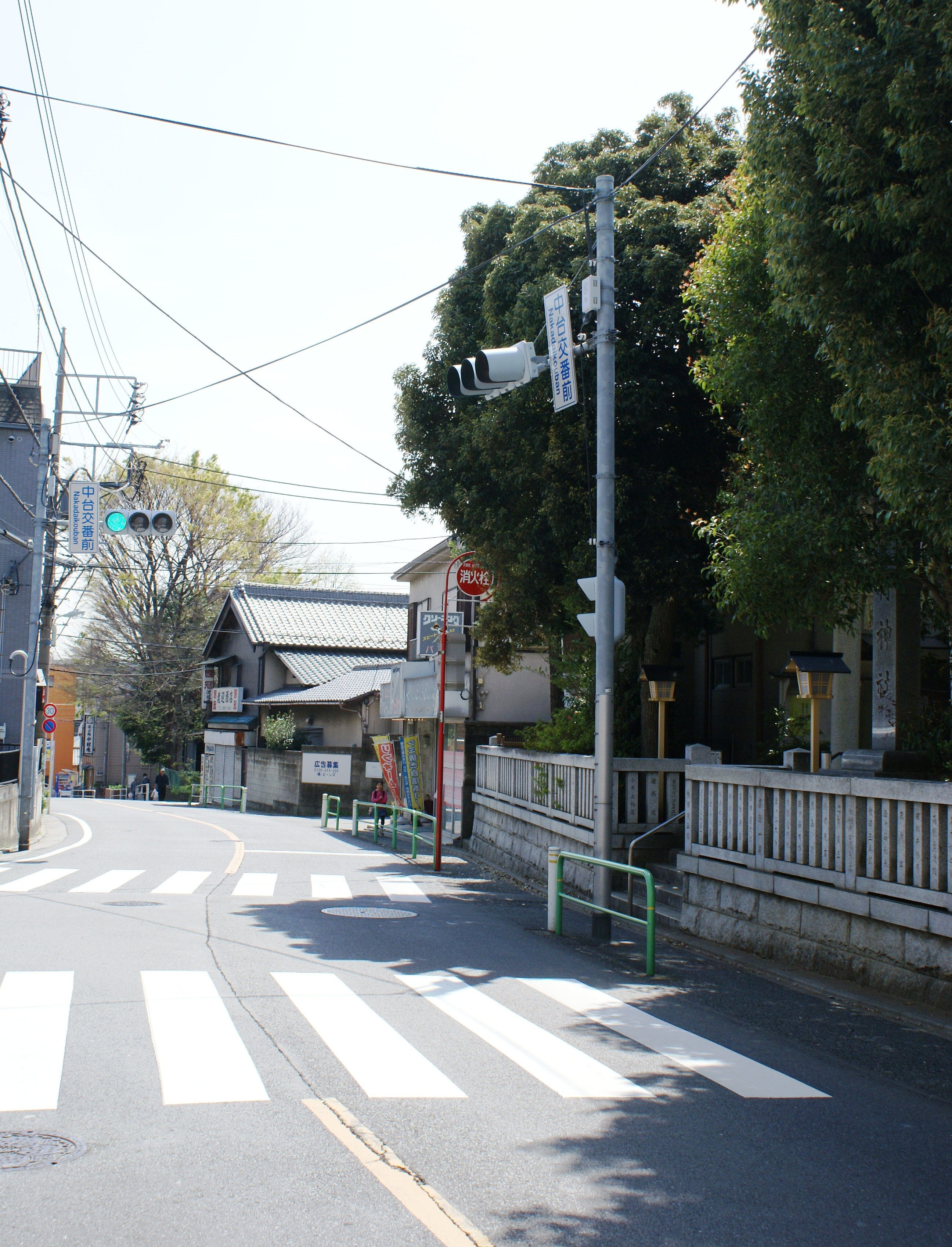 若木通り交番前